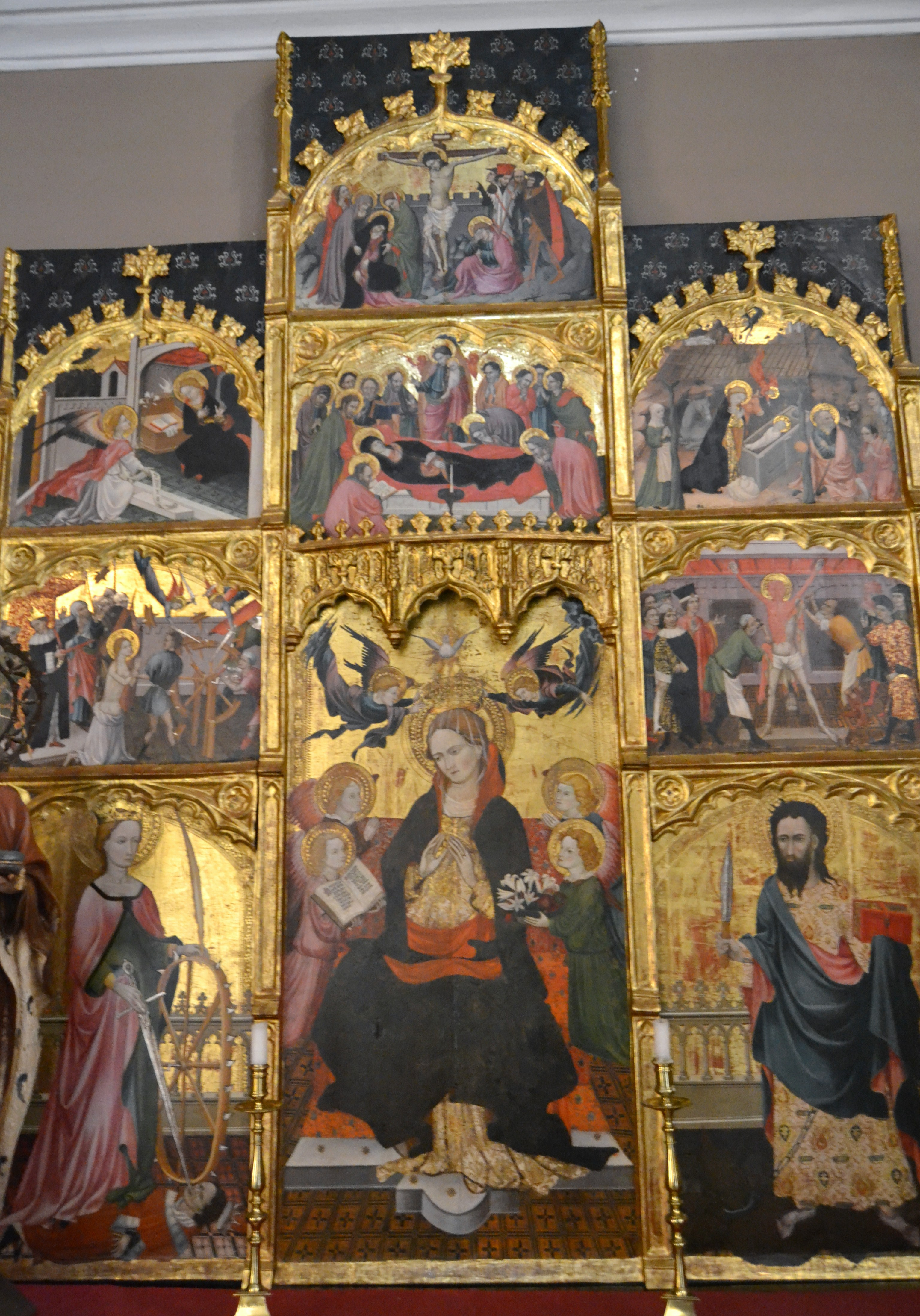 Retaule de la Mare de Déu de l'Esperança d'Antoni Peris (documentat a València entre 1404 i 1423). Es troba a l'església parroquial de Pego.